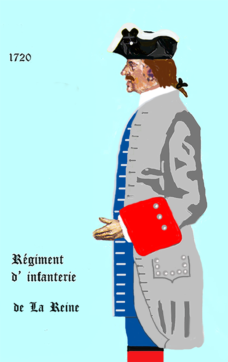 Uniform eines königlich französischen Infanterie-Regiments von 1720. - Entnommen und überarbeitet aus: „LES UNIFORMES ET LES DRAPEAUX DE L'ARMÉE DU ROI“ Marseille 1899.